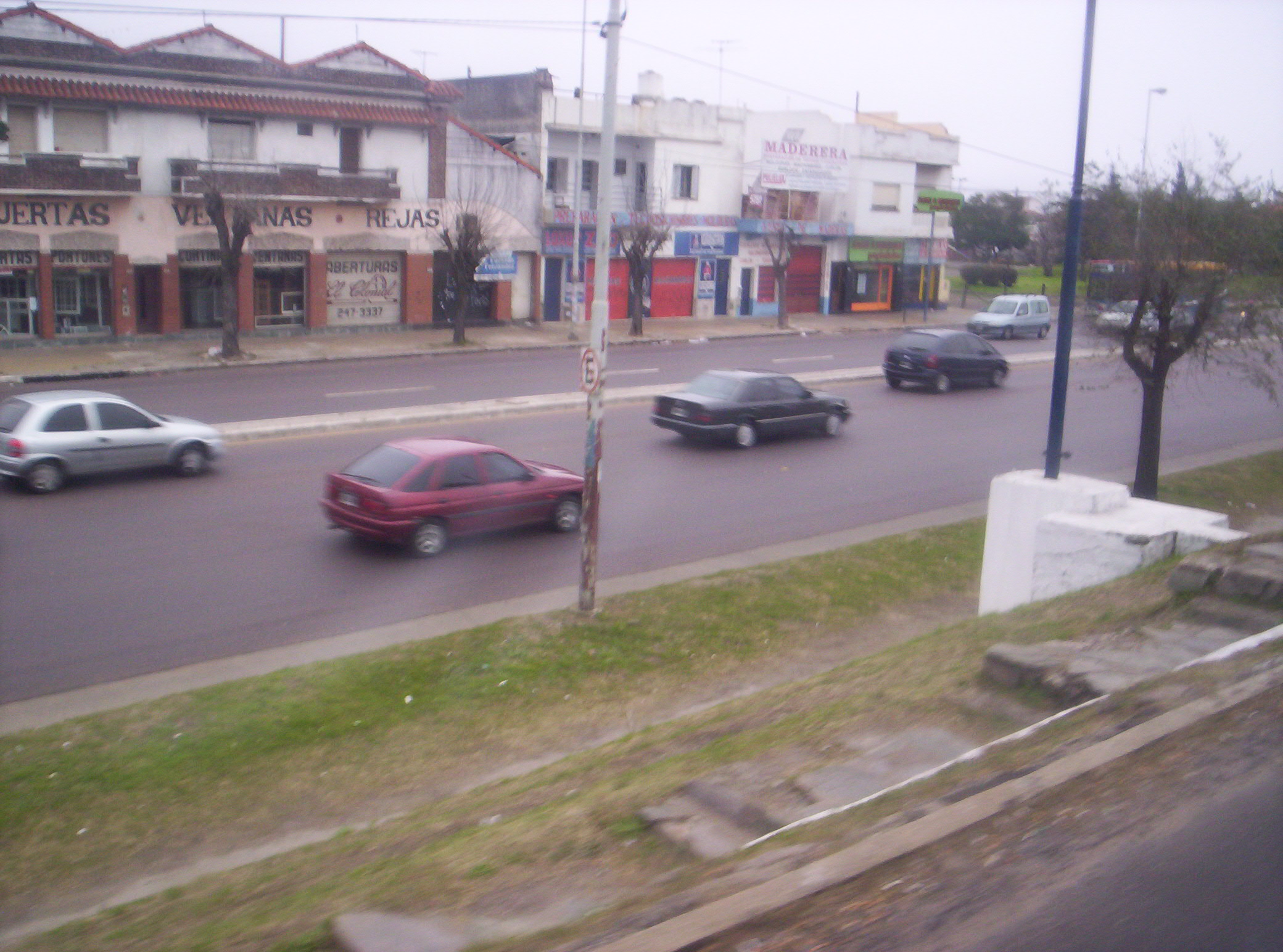 Avenida Hipólito Yrigoyen a la altura de la localidad de Remedios de Escalada.